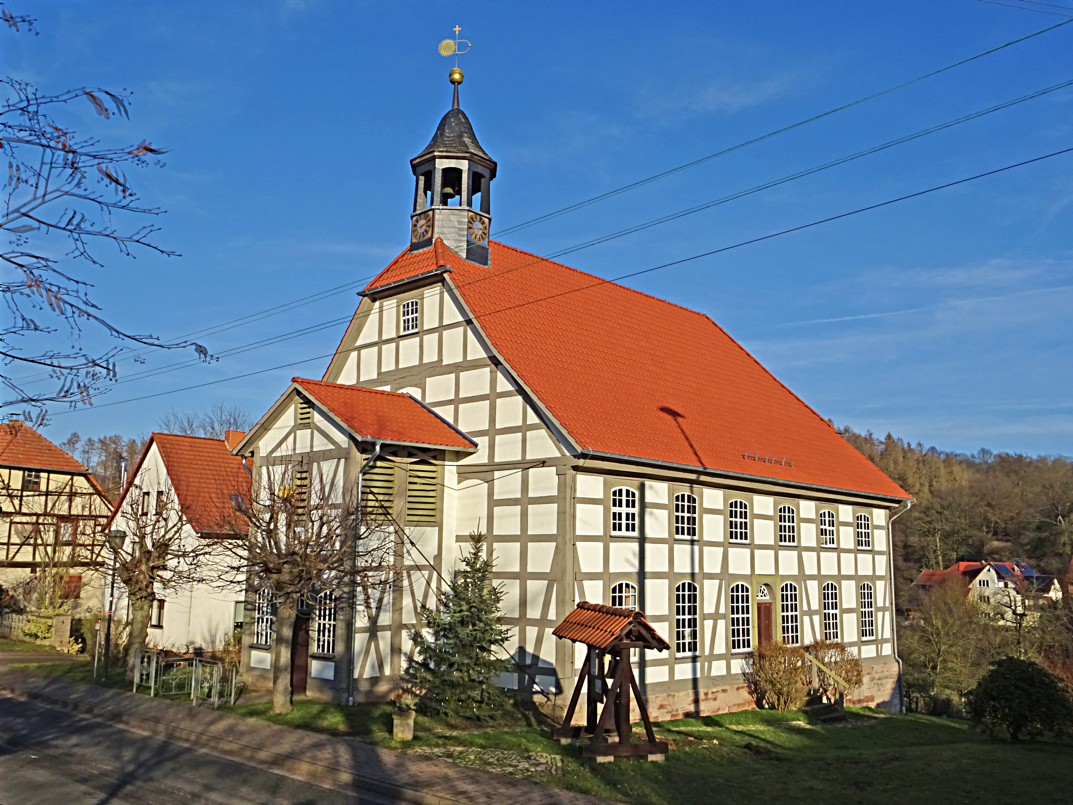 Pfarrkirche St. Nicolai in Silkerode von 1819